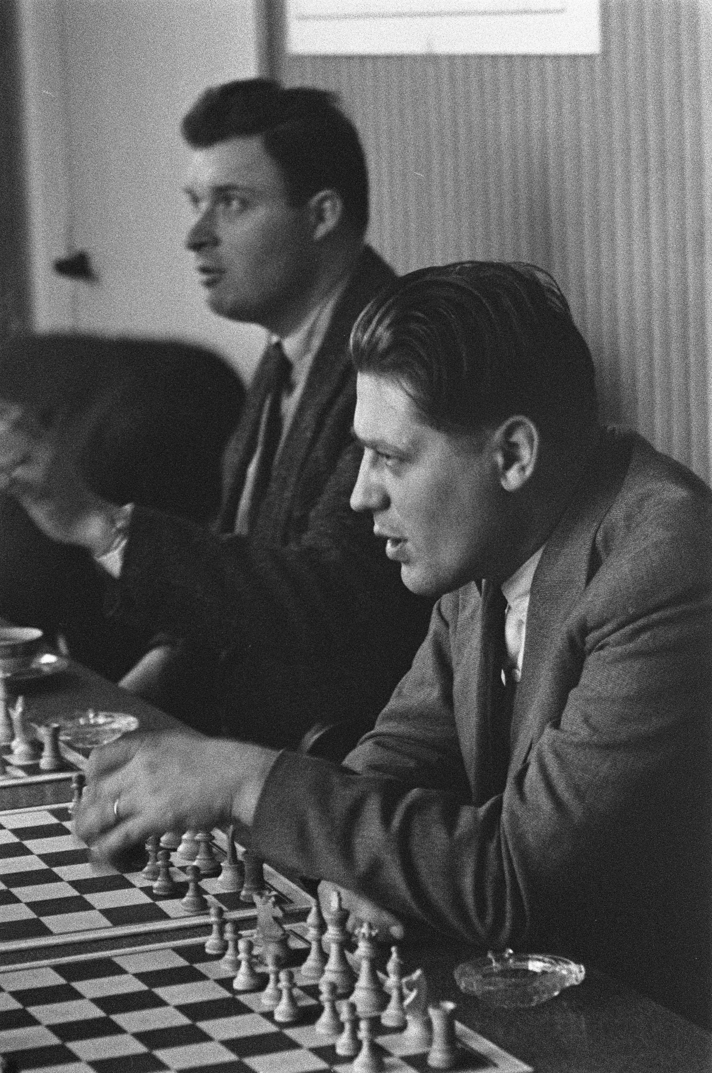 Collectie / Archief : Fotocollectie Anefo Reportage / Serie : [ onbekend ] Beschrijving : Zone-schaaktoernooi te Berg en Dal , 29. B. J. Withuis 31 + 33 B. Sliwa en dr. M. Filip , 34. B. Sliwa Datum : 21 november 1960 Locatie : Berg en Dal Trefwoorden : schaaktoernooien Persoonsnaam : B. J. Withuis, B. Sliwa, dr. M. Filip Fotograaf : Rossem, Wim van / Anefo Auteursrechthebbende : Nationaal Archief Materiaalsoort : Negatief (zwart/wit) Nummer archiefinventaris : bekijk toegang 2.24.01.05 Bestanddeelnummer : 911-8007